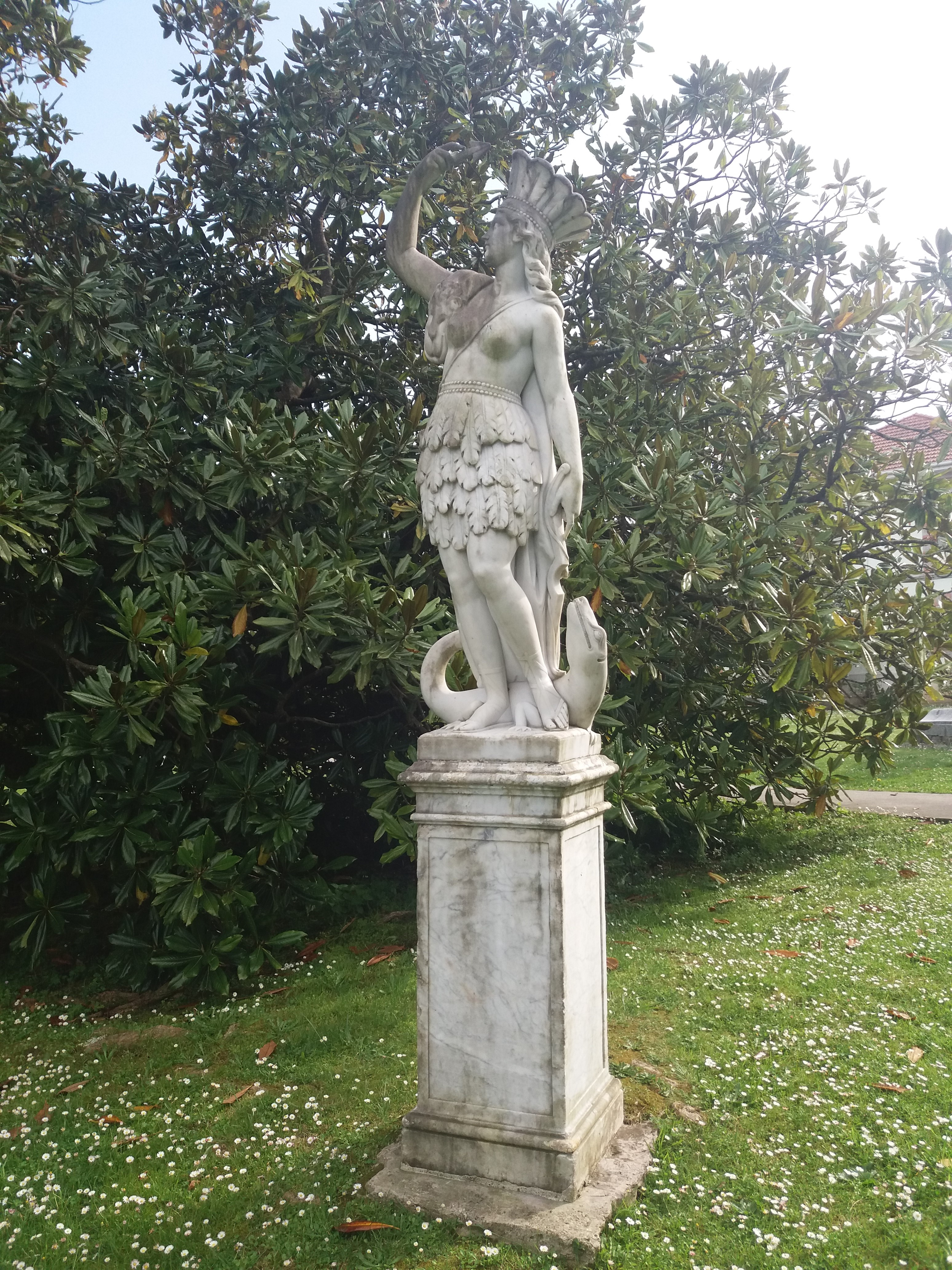 Finca del Marqués de Valdecilla 2019 alegoría a América